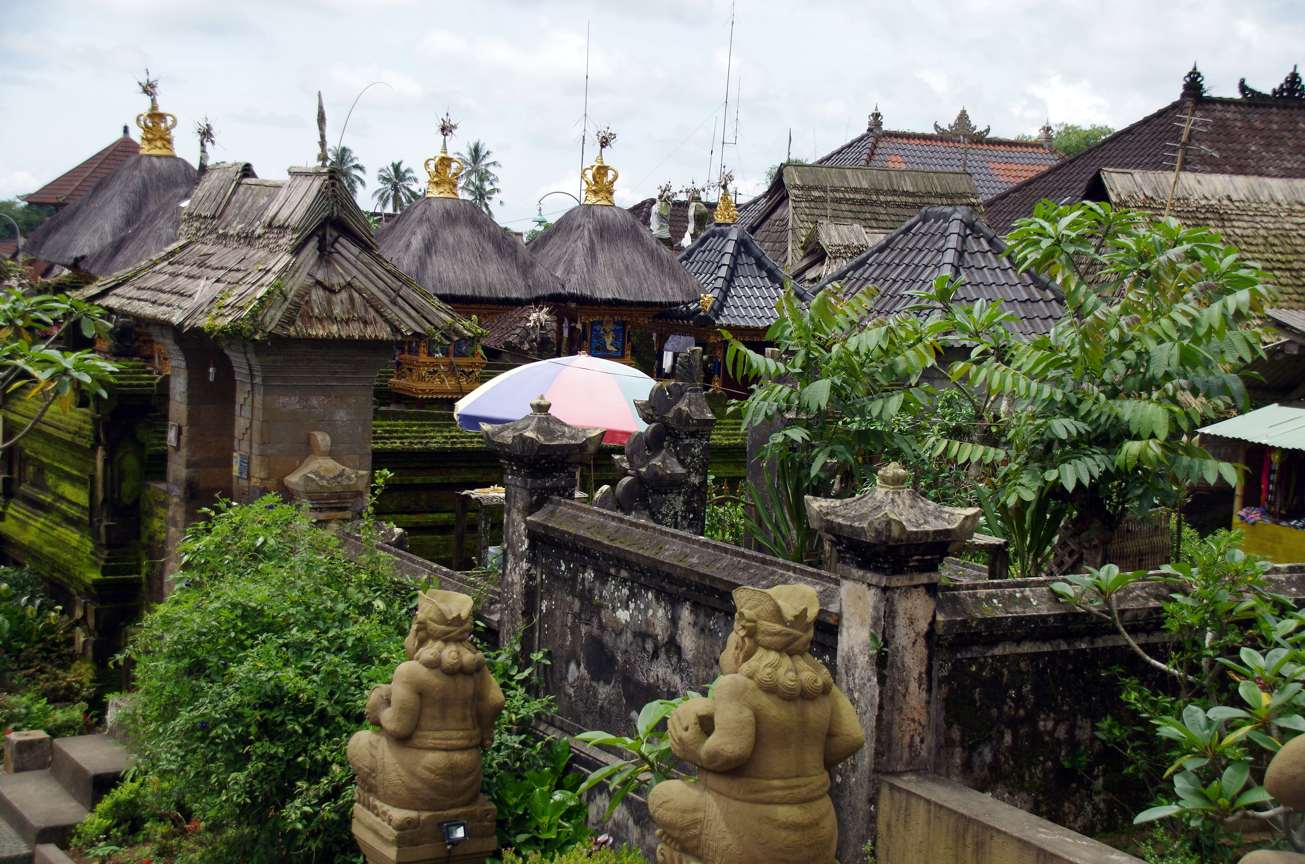 Museumsdorf Penglipuran